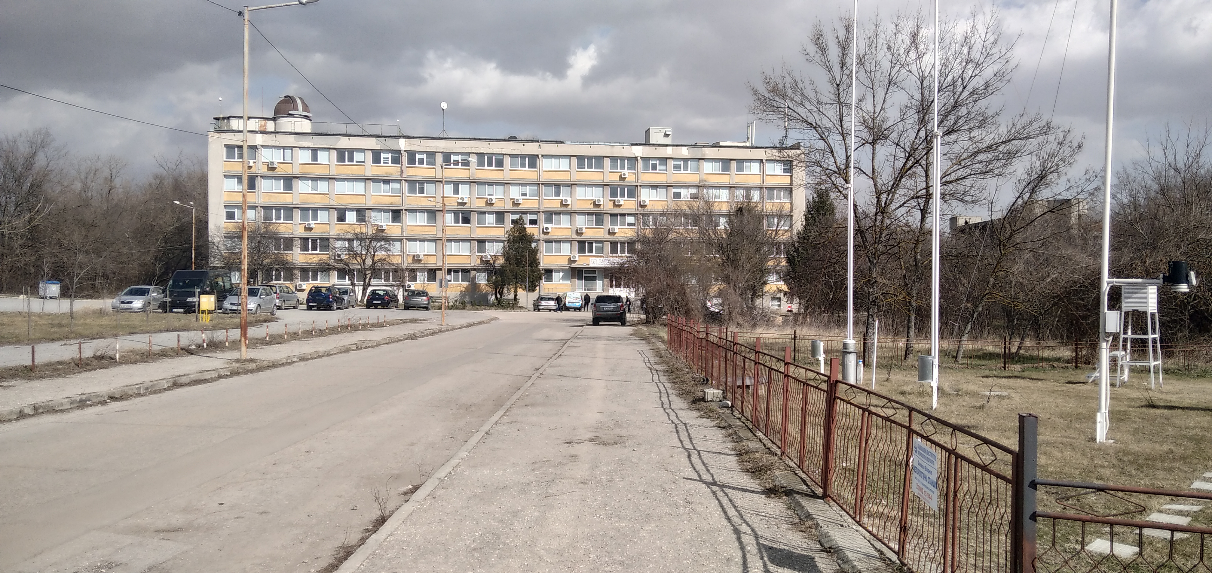 Сградата на 3-ти корпус на Шуменския университет, където се помещават Факултетът по математика и информатика и Факултетът по технически науки.